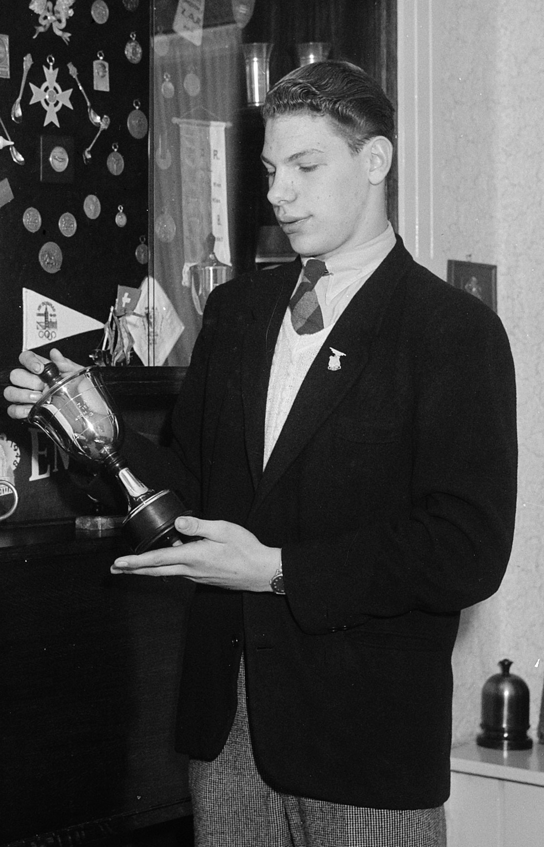 Wereldrecordhouder Bob Bonte thuis